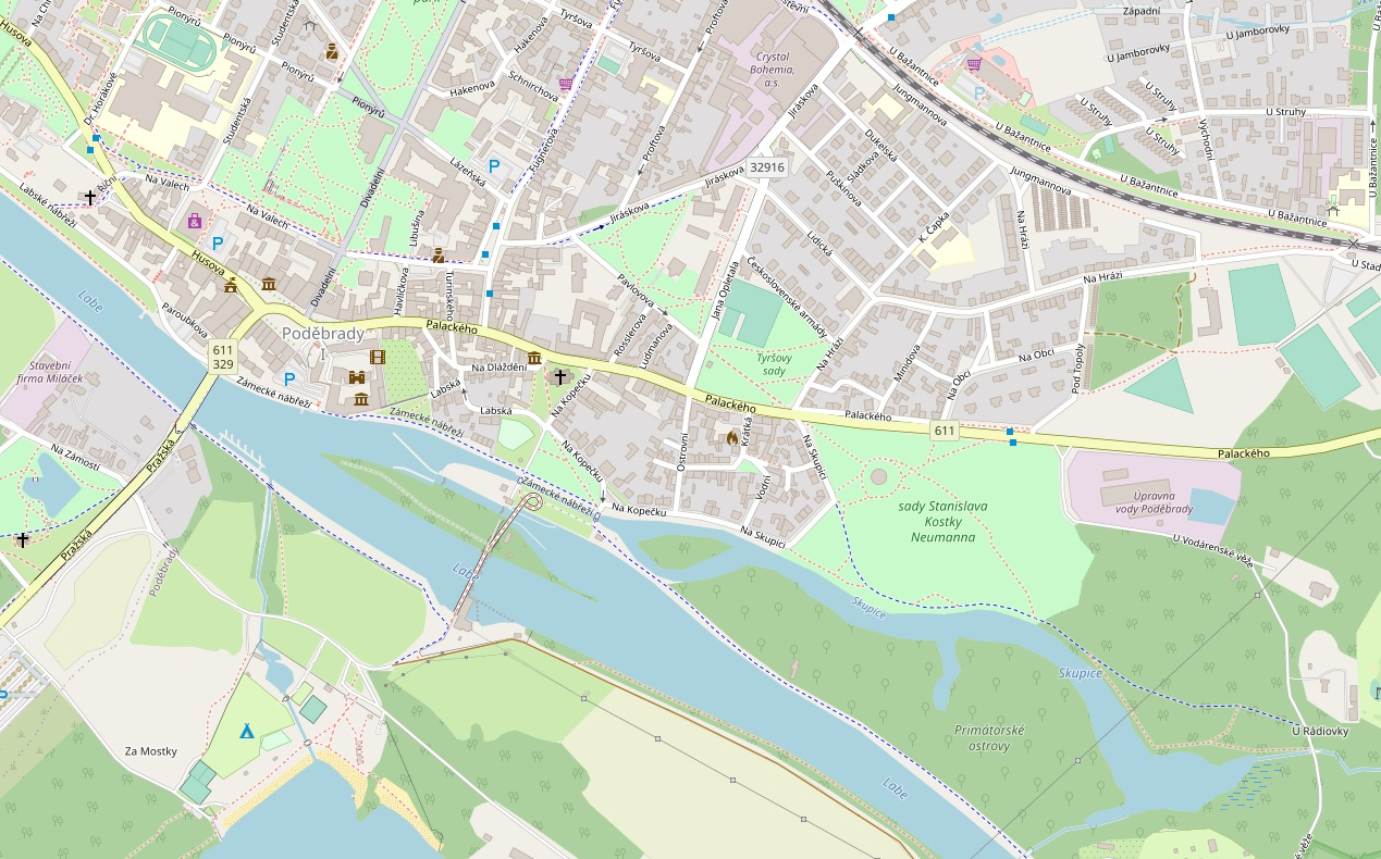 Mapa okolí poděbradského zdymadla s hydroelektrárnou.